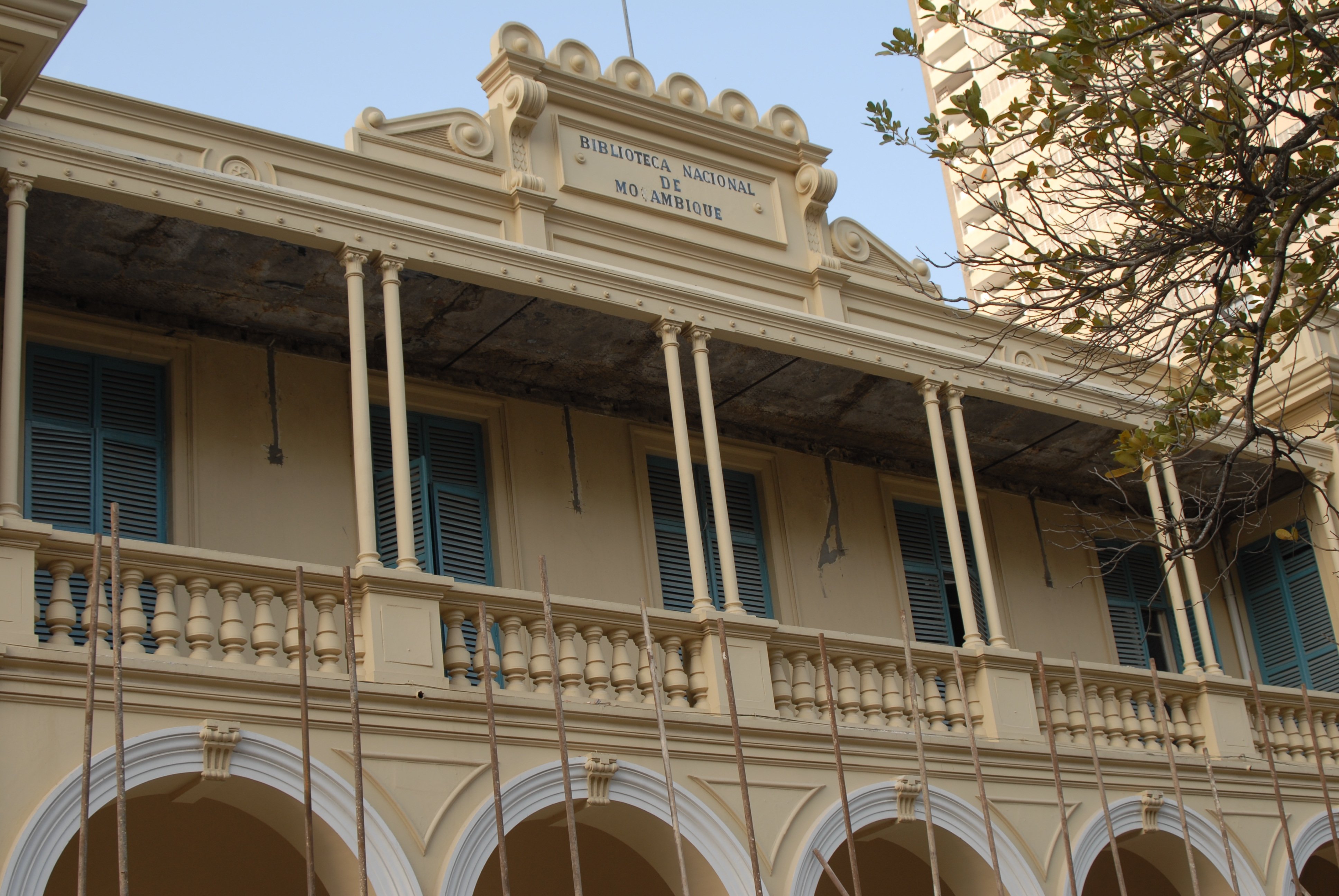 National Libray, Maputo, Mozambique